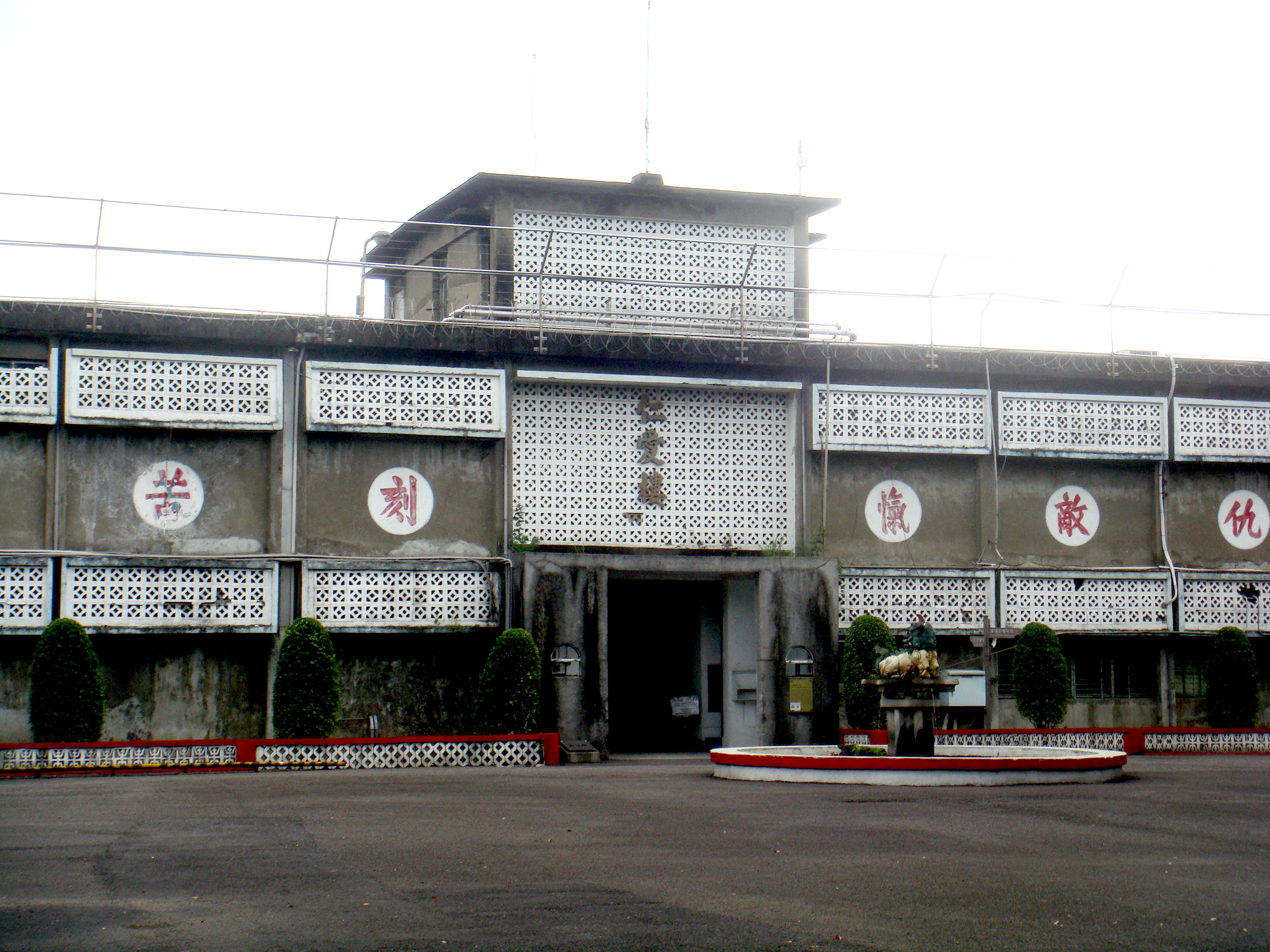 景美人權園區內建築。